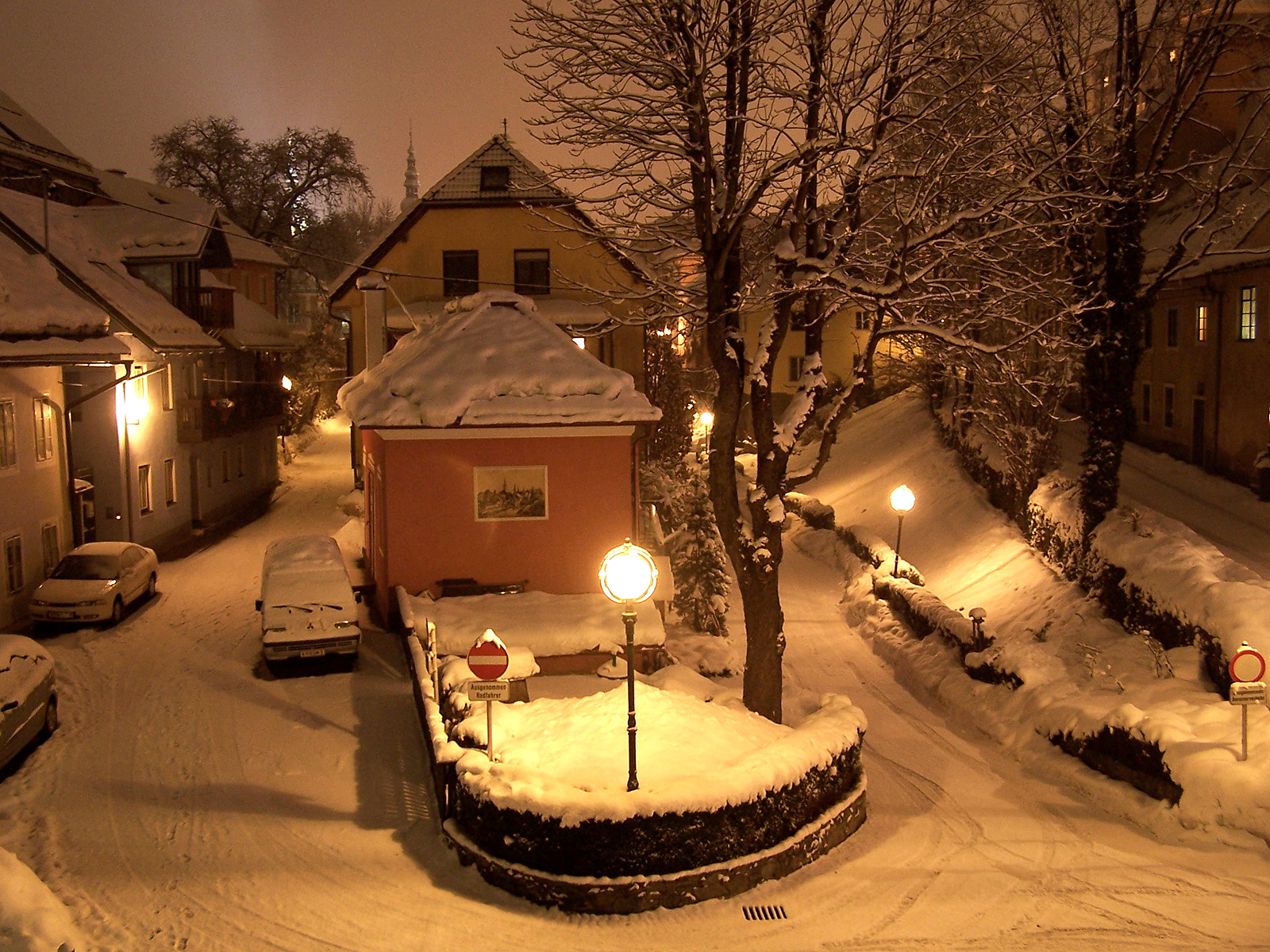 Die Gassen des Lendhafens in Klagenfurt, Nachtaufnahme im Winter - alleys around the Lendhafen (view at night) 14:38, 28. Dez 2005 Eixi 1600 x 1200 (801741 Byte) (* Bildbeschreibung: Die Gassen des Lendhafens in Klagenfurt, Nachtaufnahme im Winter * Quelle: selbst fotografiert * Fotograf/Zeichner: ~~~~ * Datum: 27. Dezember 2005)